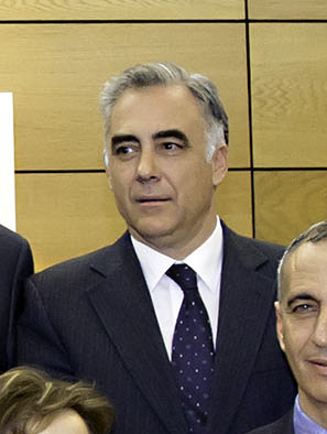 18-04-2012 El consejero de Sanidad y Asuntos Sociales de Castilla-La Mancha en la reunión del Consejo Interterritorial de Salud.